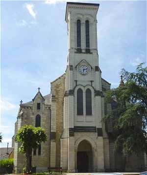 On peut observer la façade ainsi que le parvis de cette église située à Châteauneuf, commune de Châtellerault.